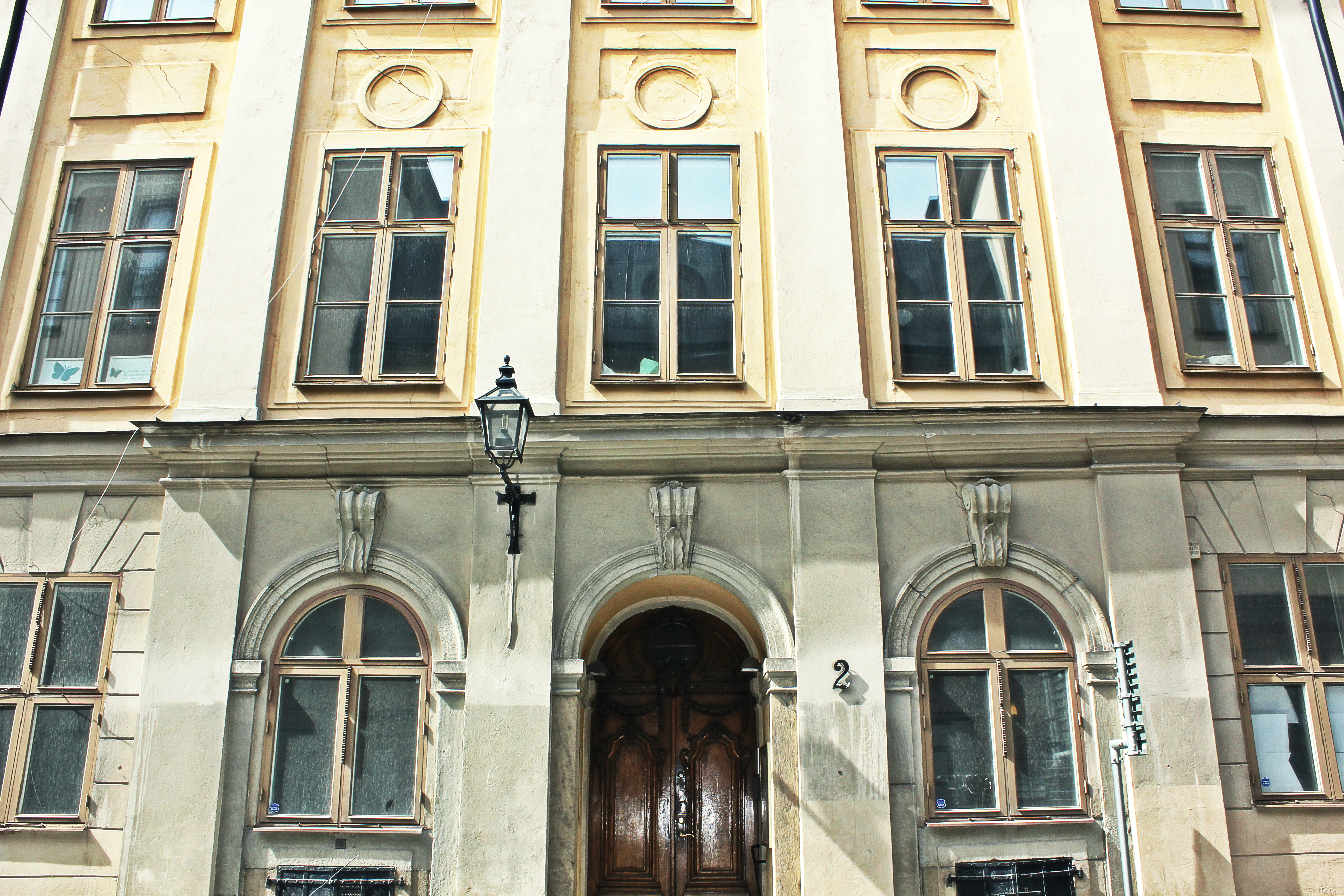 Cancer- och Allergifondens lokaler på Munkbrogatan 2, Gamla Stan i Stockholm